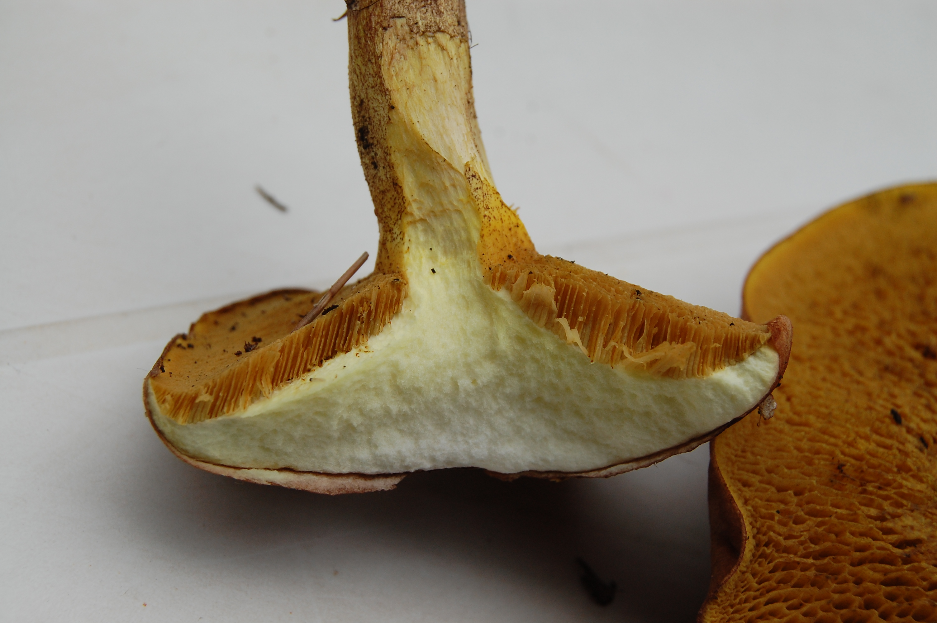 Suilllus collinitus